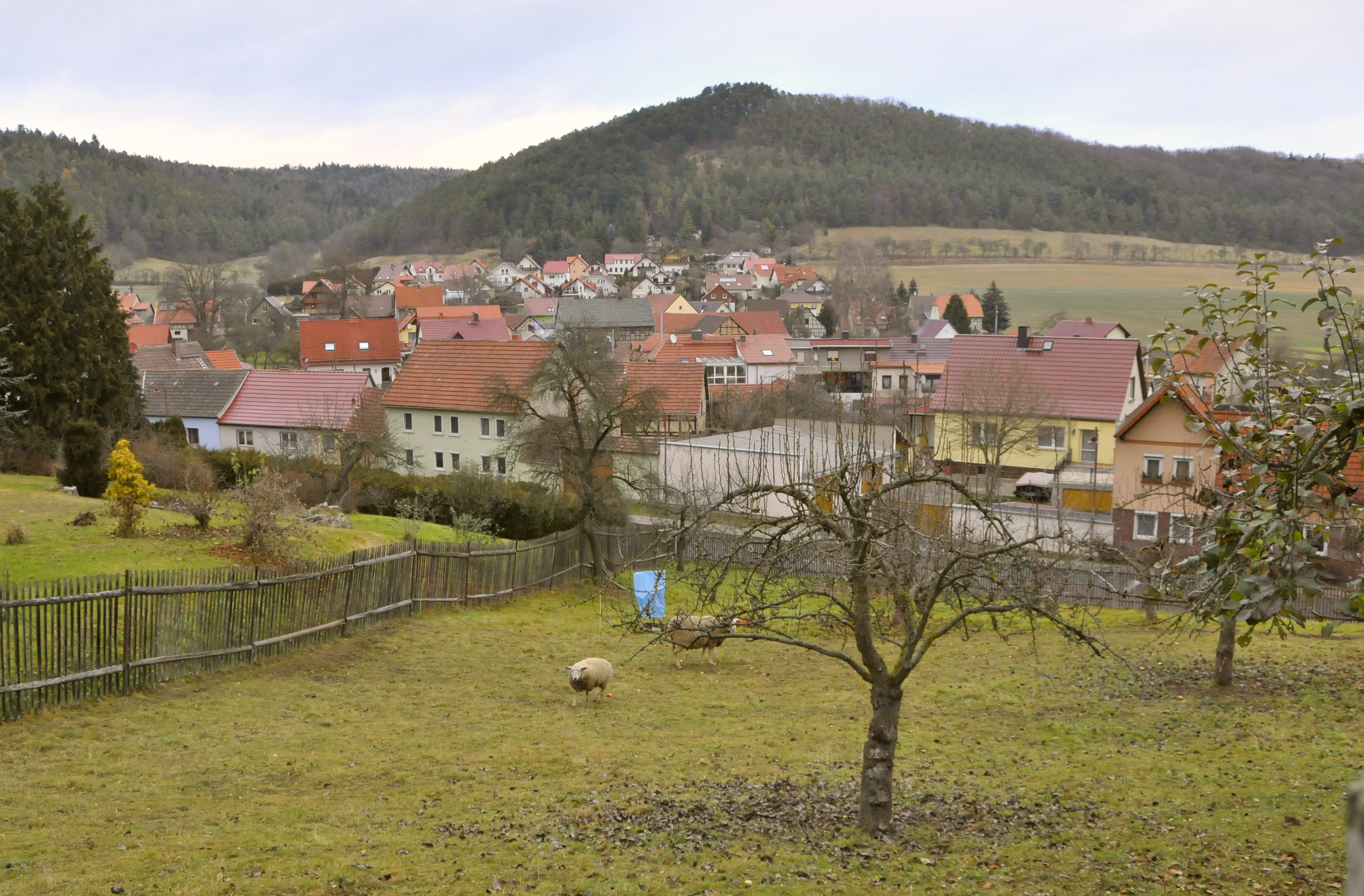 Nauendorf, Ansicht